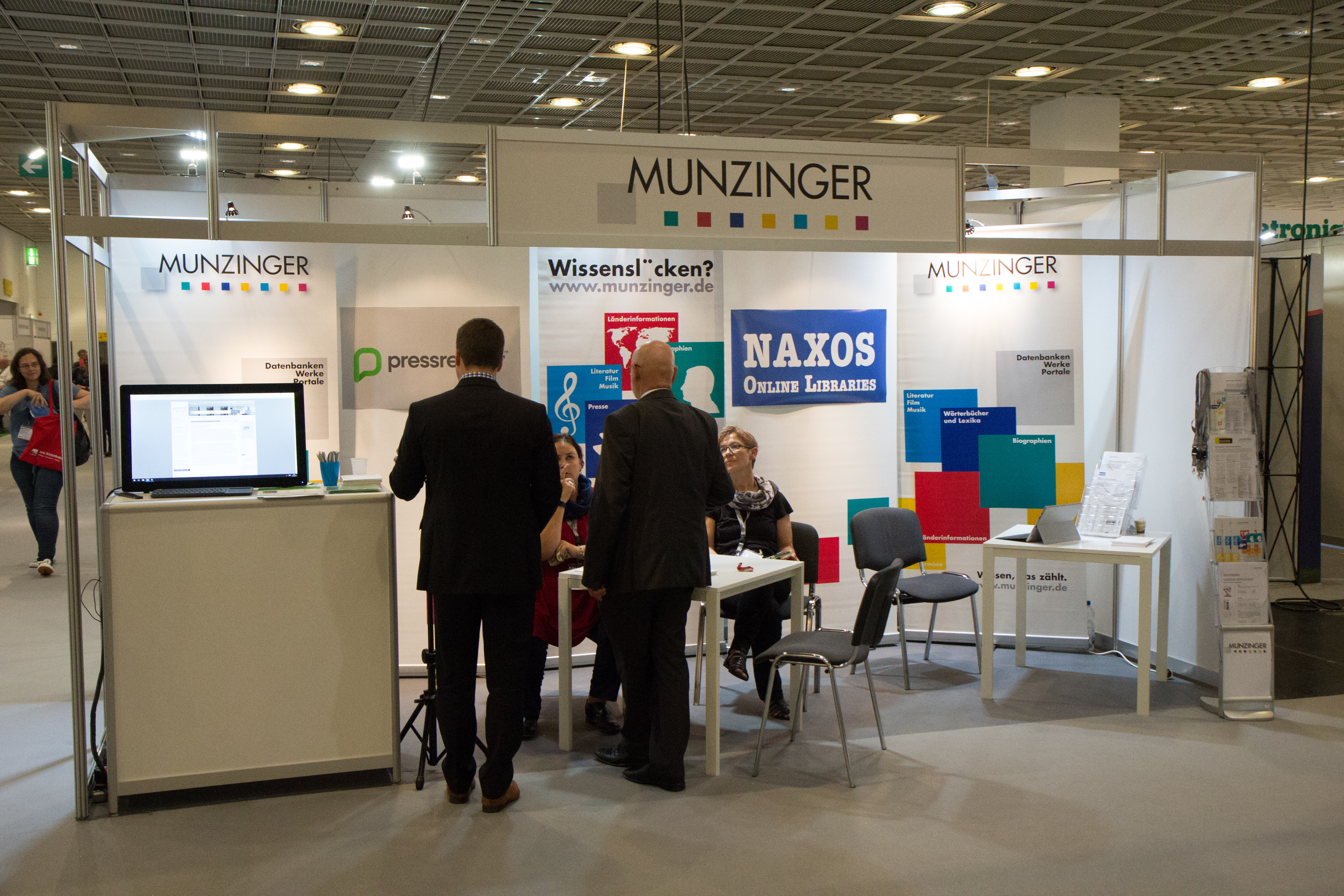 106. Deutscher Bibliothekartag in Frankfurt/Main